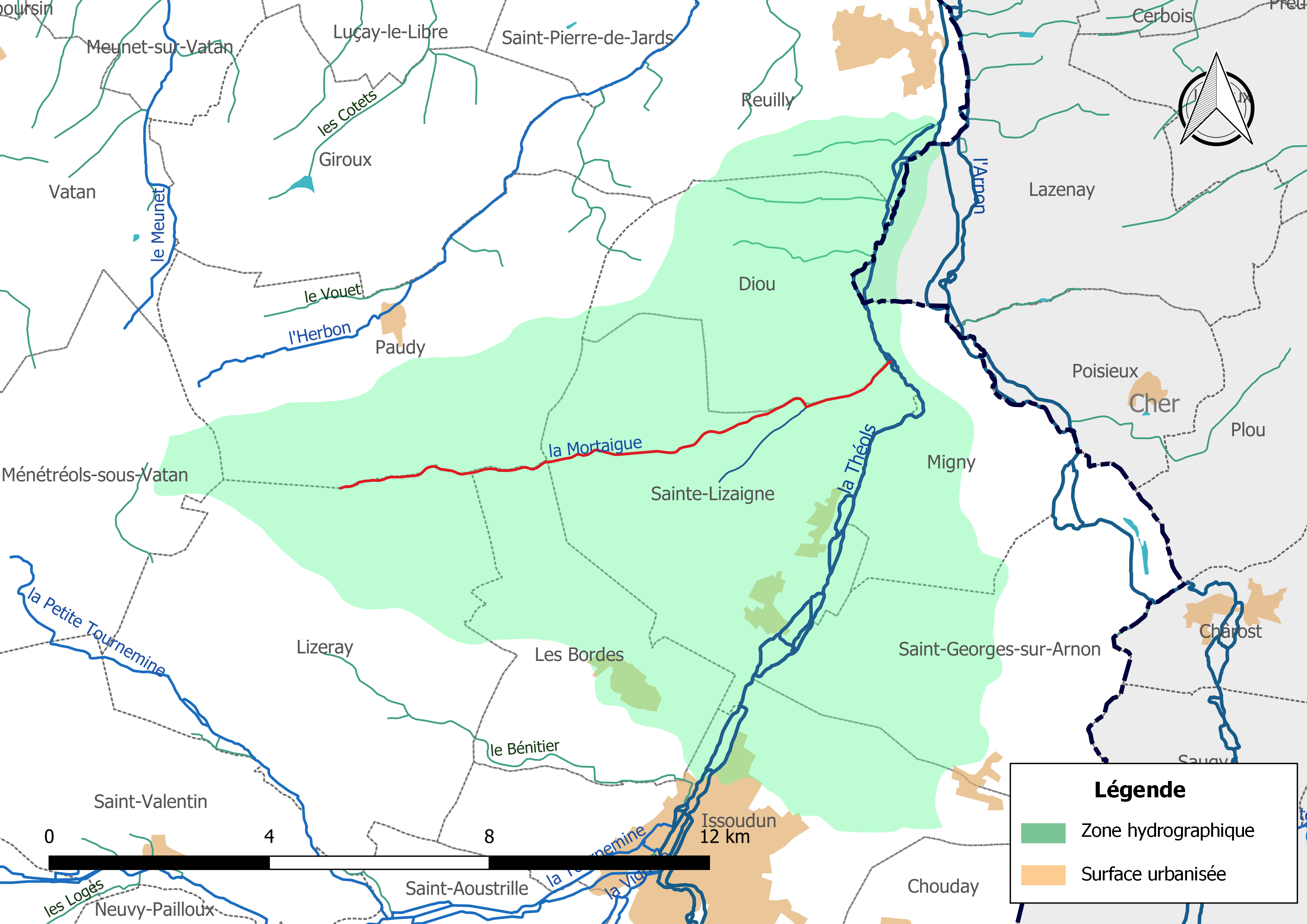 Carte du cours d'eau « la Mortaigue » (France) et de la zone hydrographique dans laquelle il s'insère.